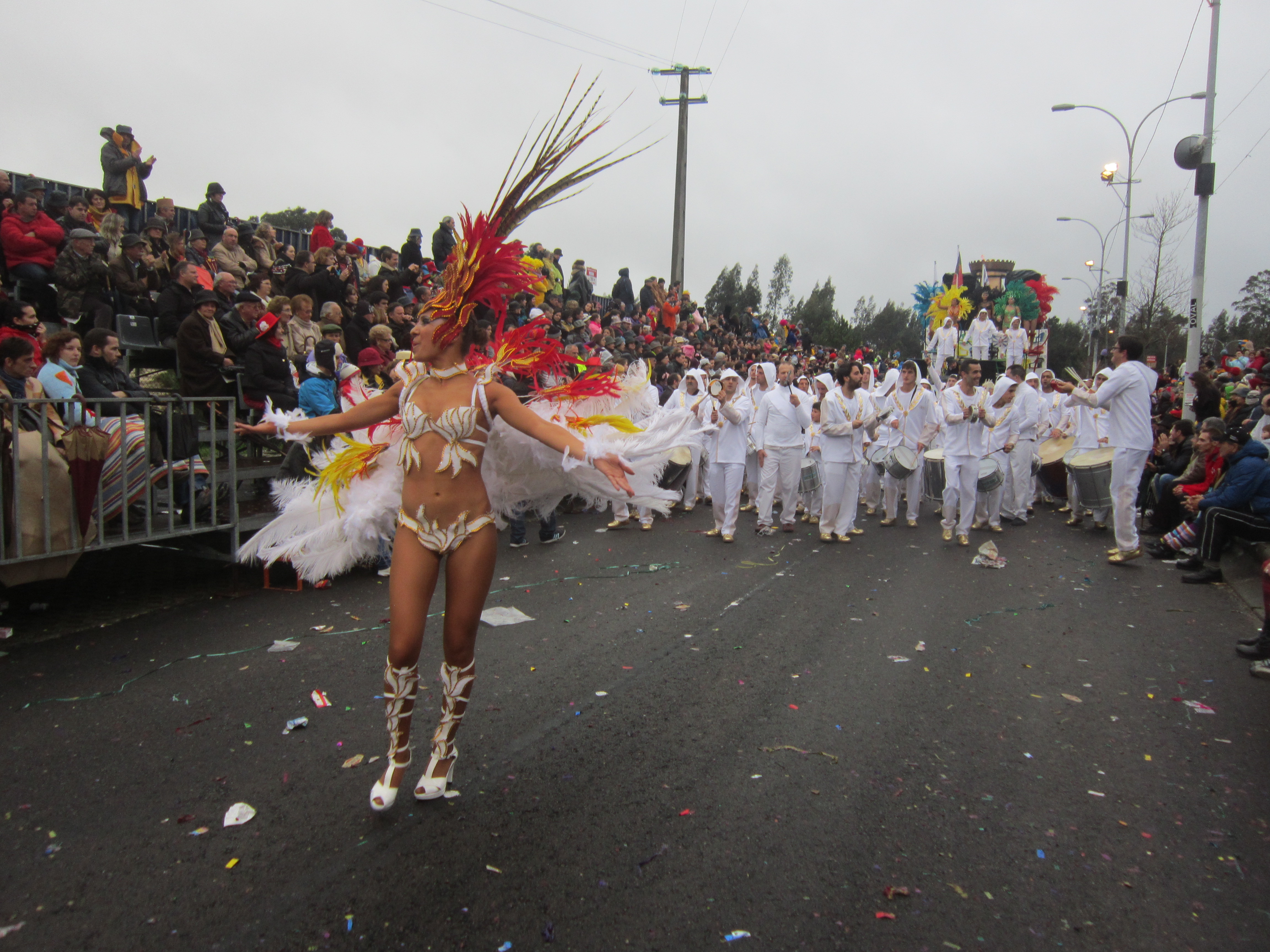 Escola de Samba Charanguinha